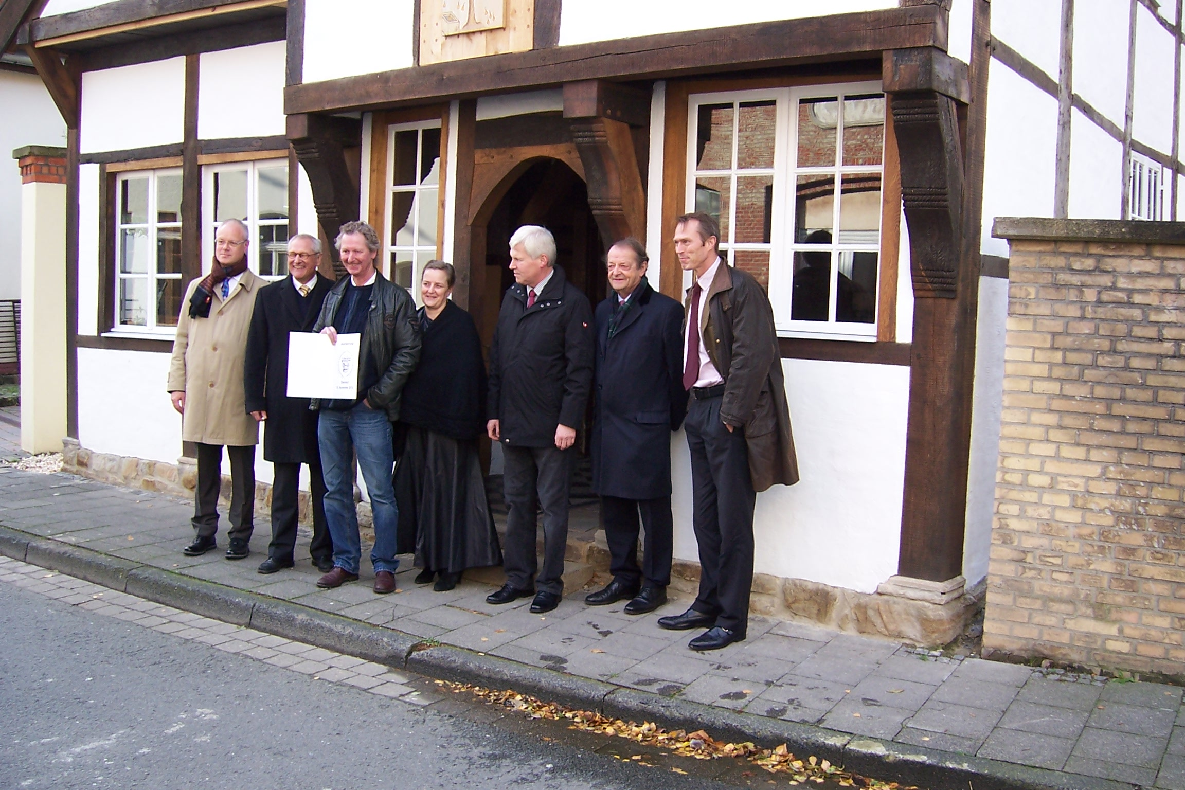 Pressetermin am 10. November 2013 anlässlich der LWL-Denkmalpflegepreisverleihung. Preisträger Gronau, ganz rechts Dr. Thomas Otten, NRW-Bauministerium